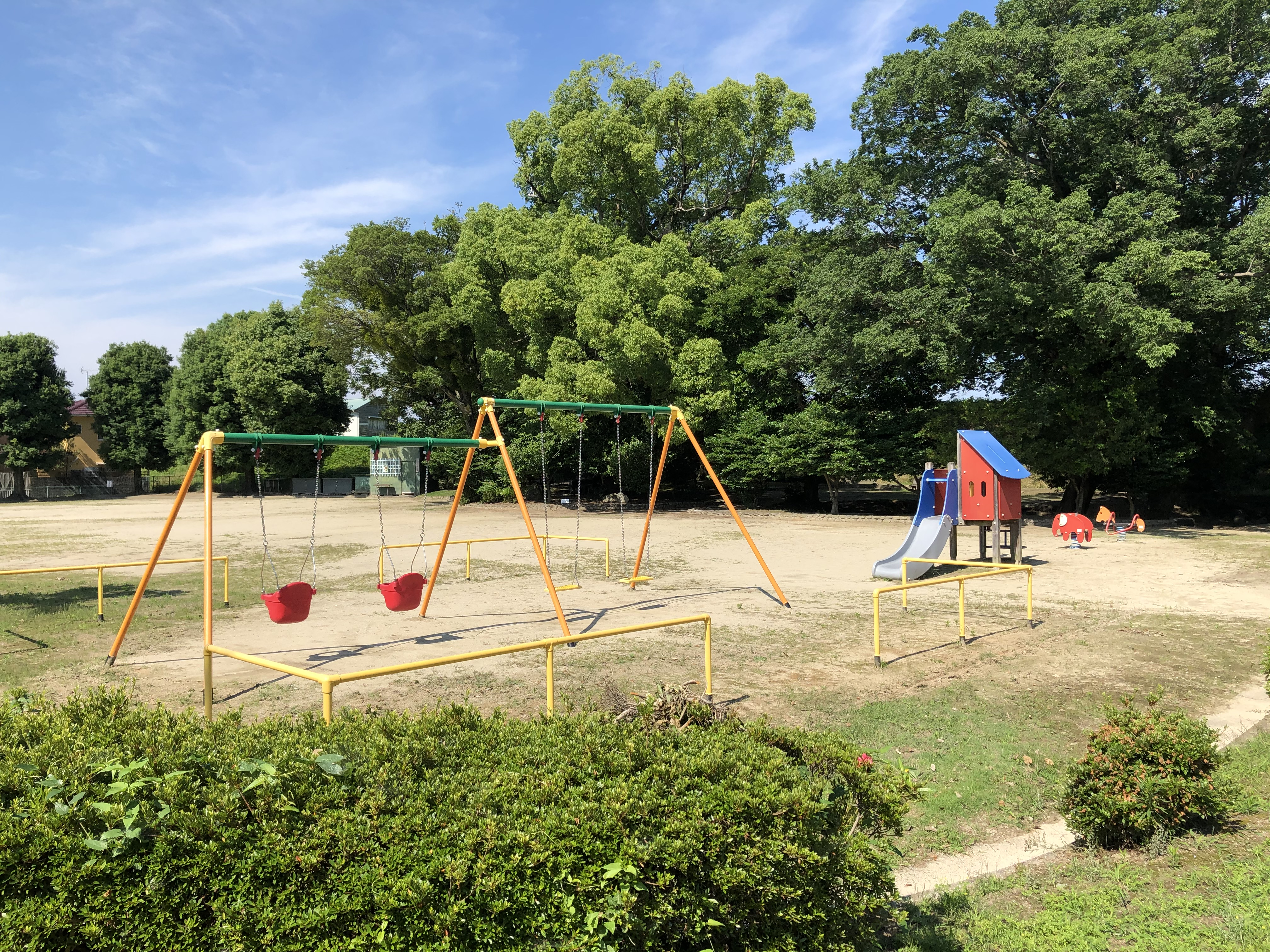 諏訪公園（岡崎市八帖南町）